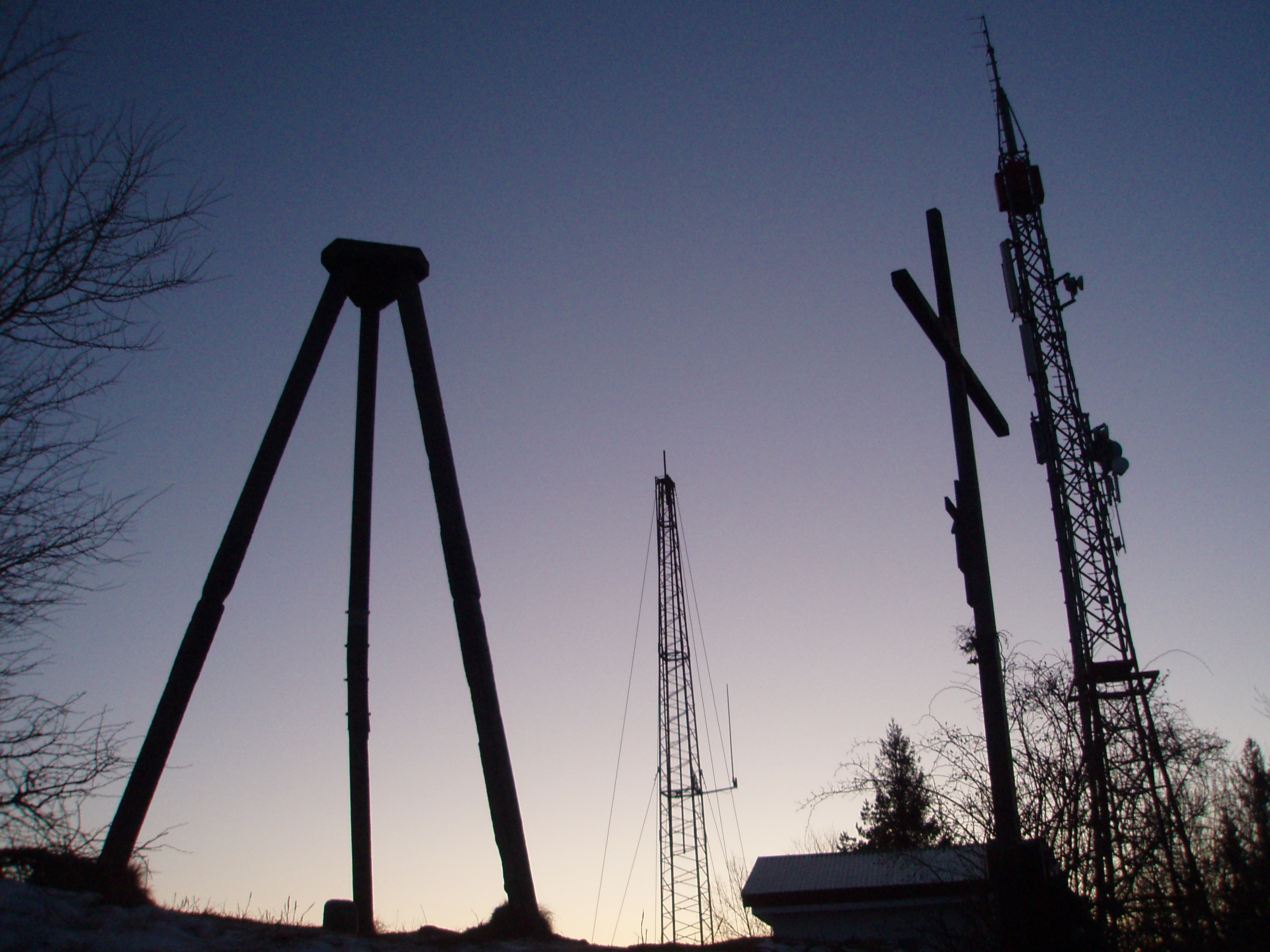 Na szczycie Grojca 612 n.p.m., Grojec